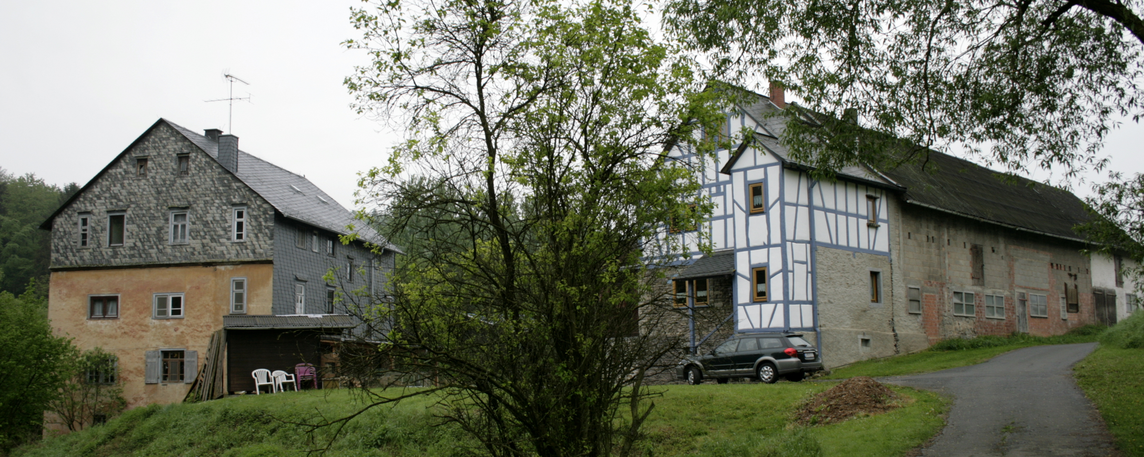 Mühle bei Runkel-Eschenau, Deutschland